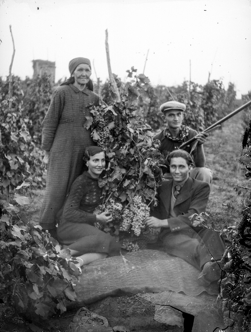 Grup în vie